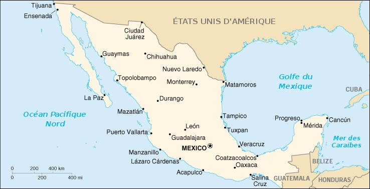 French map of Mexico (wp-EN) / Carte du Mexique (wp-FR), en français Fichier GIMP disponible : Image:Carte_du_Mexique.xcf